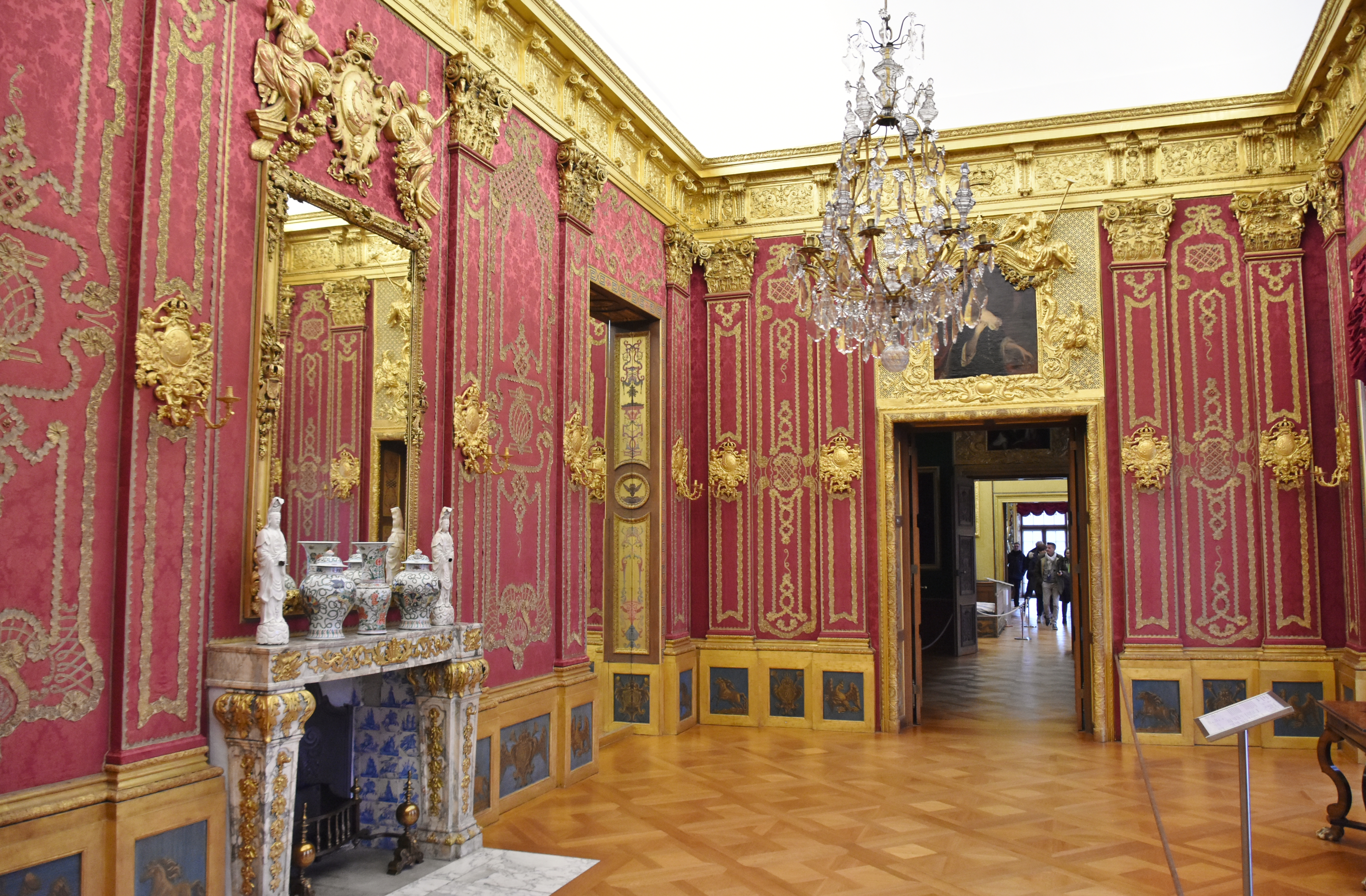 Charlottenburg Palace, 1695-1746, Berlin (41)